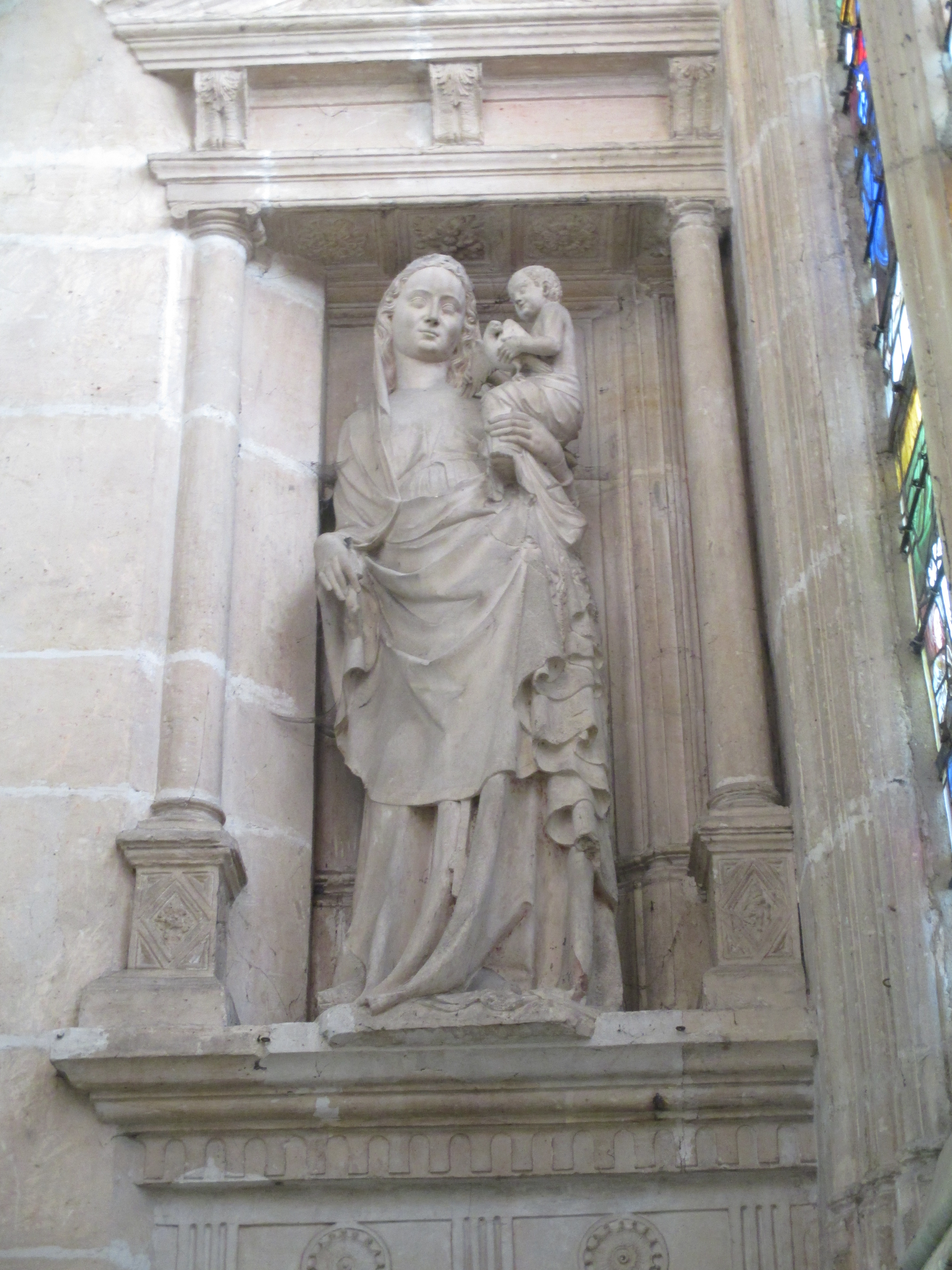 Statue de Notre Dame des Vertus (XIVe siècle) dans la première chapelle du bas-côté sud de l'église Notre-Dame-de-l'Assomption de Villeneuve-sur-Yonne (Yonne, archidiocèse de Sens-Auxerre).